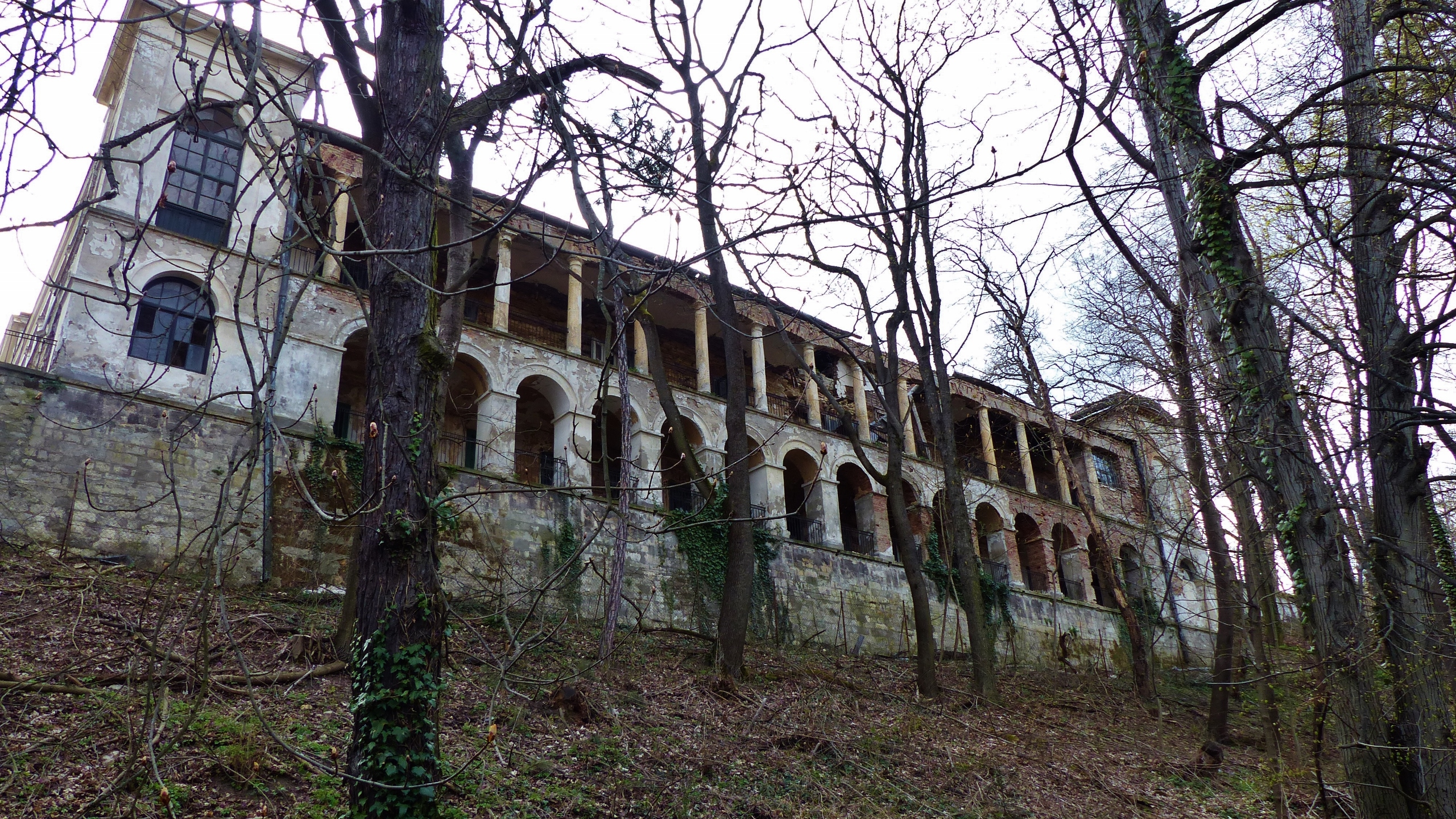 Fácános romos épülete, tervezte Hild József (wikipédia)